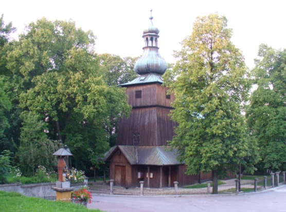 Kościół w Podstolicach